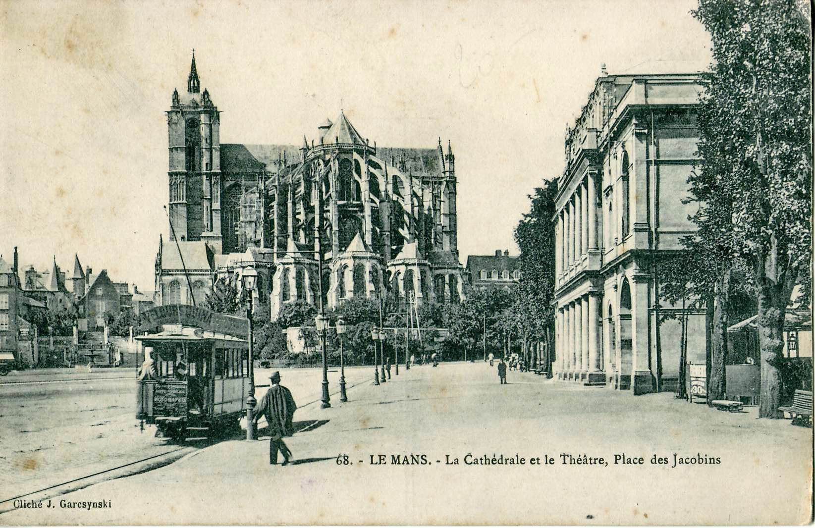 Carte postale ancienne éditée par J. Garcsynski, n°68 : Le Mans - La Cathédrale et le Théâtre, Place des Jacobins Vue d'une rame du tramway du Mans